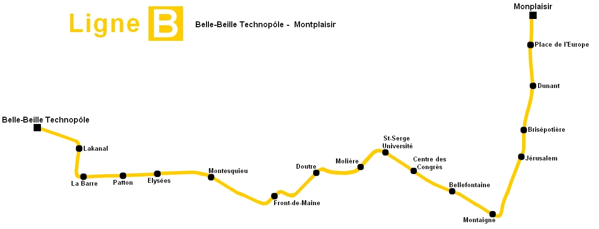 Tracé géographique de la future ligne B du tramway d'Angers